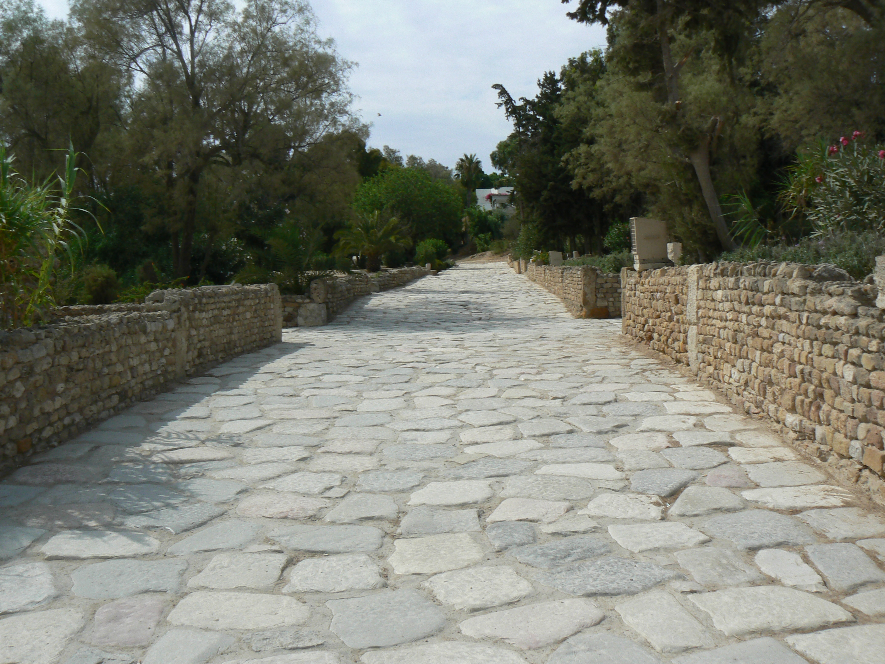 rue romaine du parc des thermes d'Antonin de Carthage, Tunisie